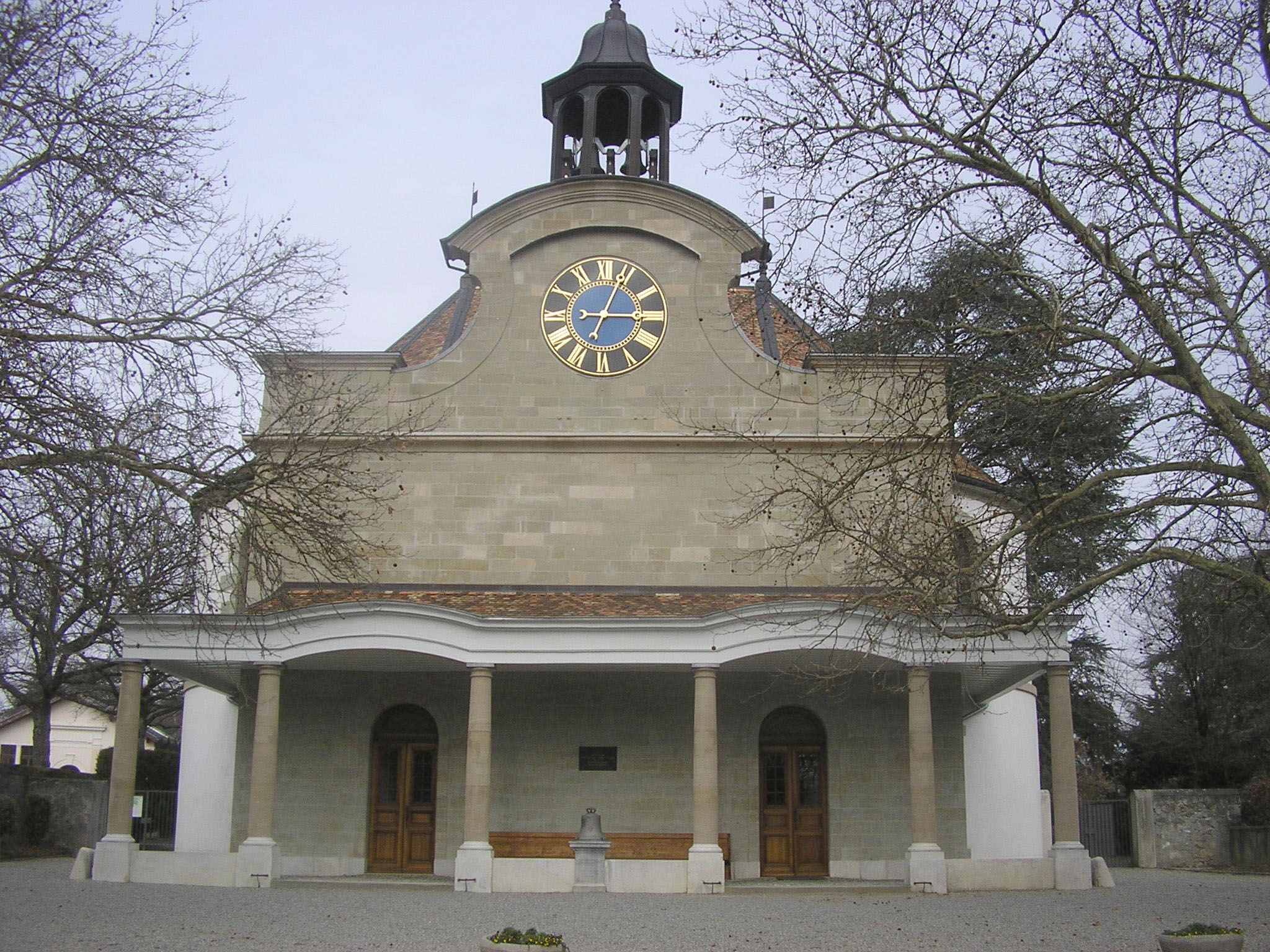 Temple de Chêne-Bougeries, bâti en 1758, de forme elliptique. Bien culturel d'importance nationale.